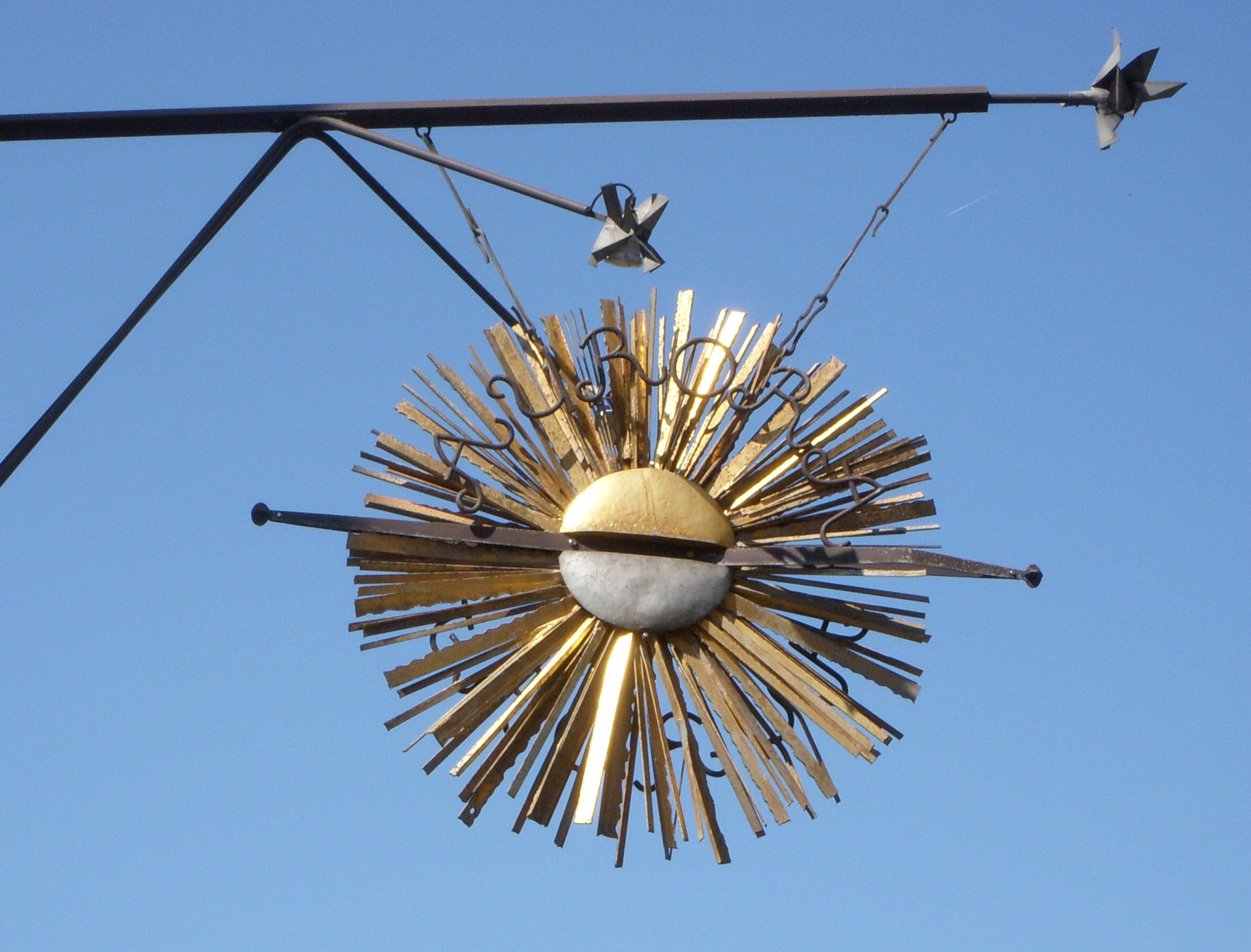 Flaggskylt "Aurora" på Petersenska huset i Gamla stan. Skylten ritades av Olle Nyman